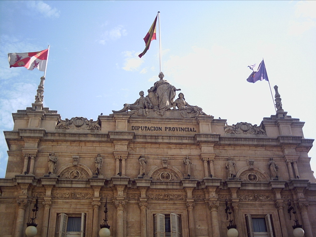 Detalle de la fachada principal del Palacio de la Diputación Provincial de Palencia